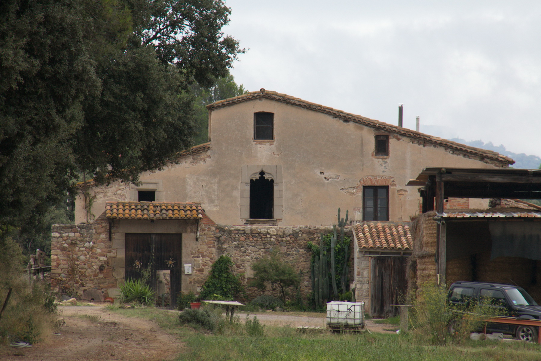 Can Marques (Canovelles)